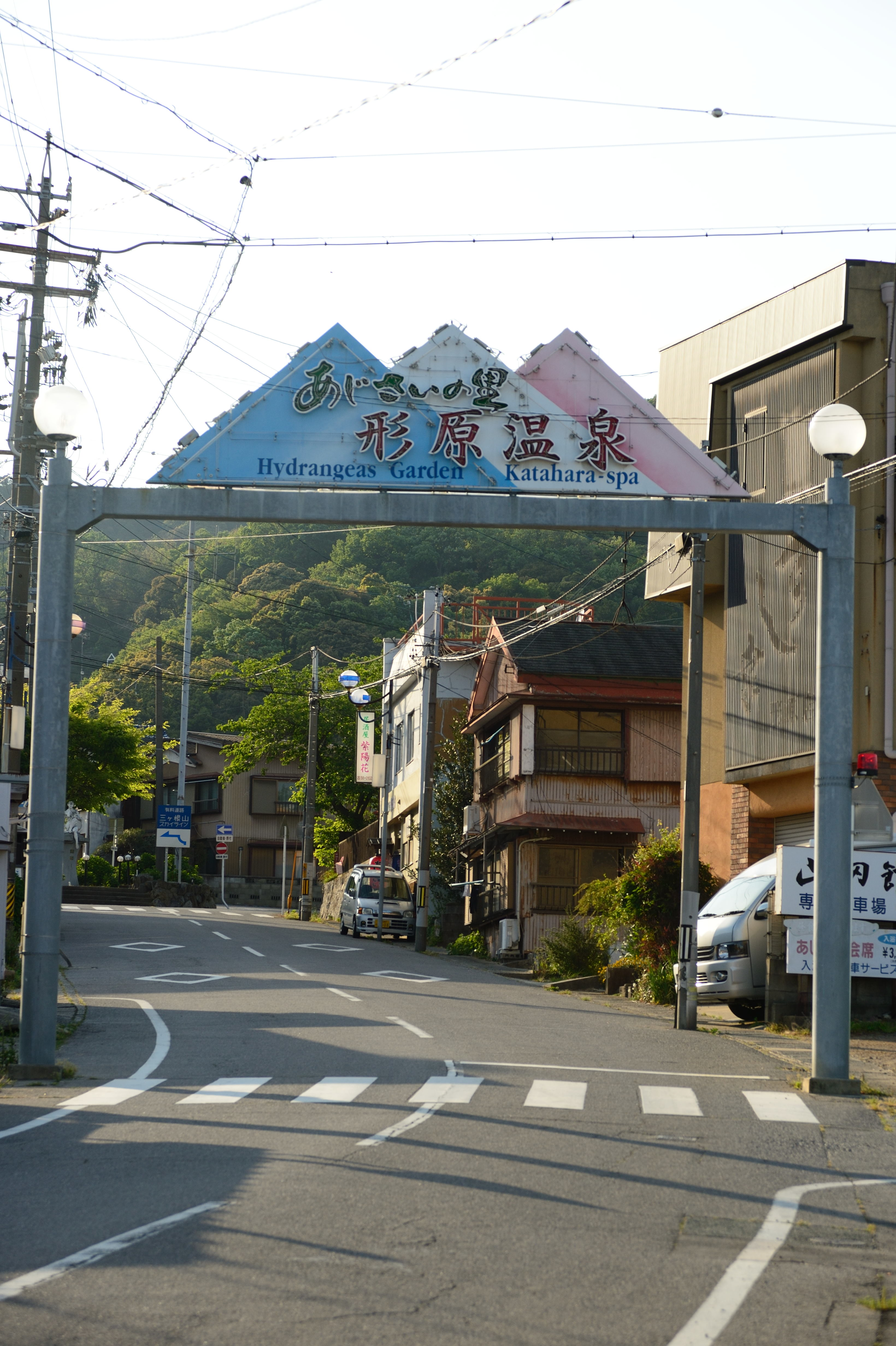 形原温泉 入口